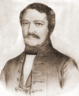 Nyáry Pál arcképe. Barabás Miklós litográfiája (1848). forrás